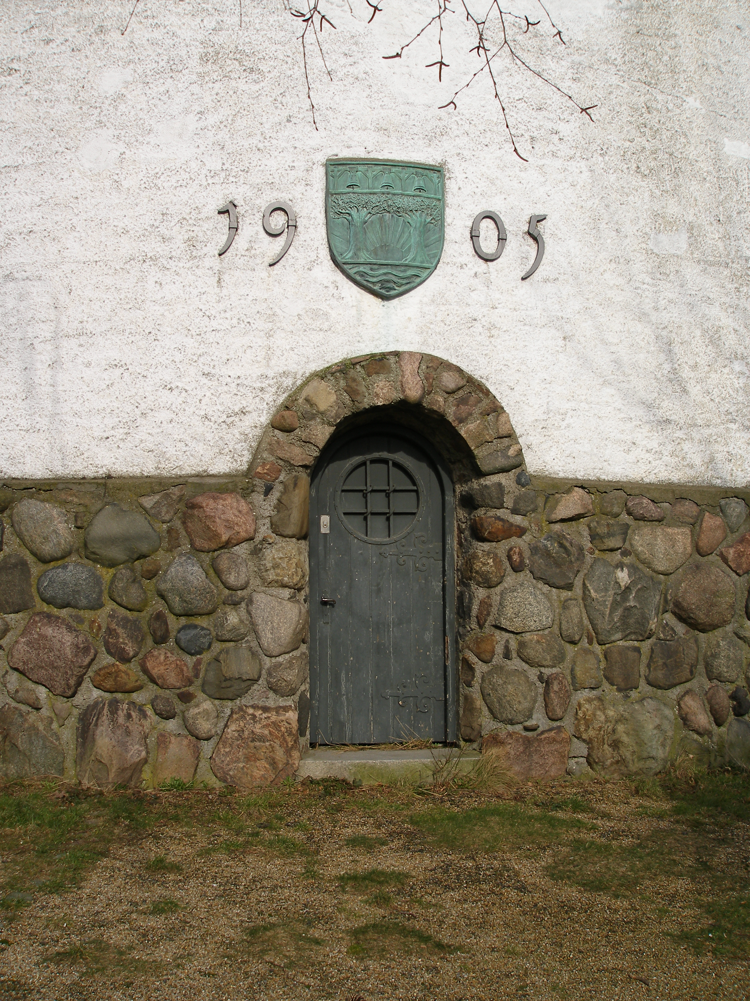 Indgangspartiet til Det gamle vandtårn (opført 1905-07) på Ræveskovvej i Gentofte